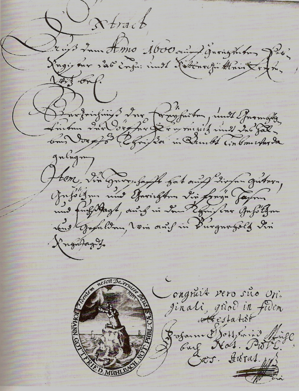 Auszug aus dem Erb-Register des Lehn- und Rittergutes Prestewitz von 1600